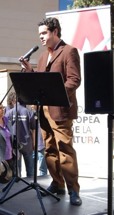 foto tomada por mi de Fernando Alonso Barahona